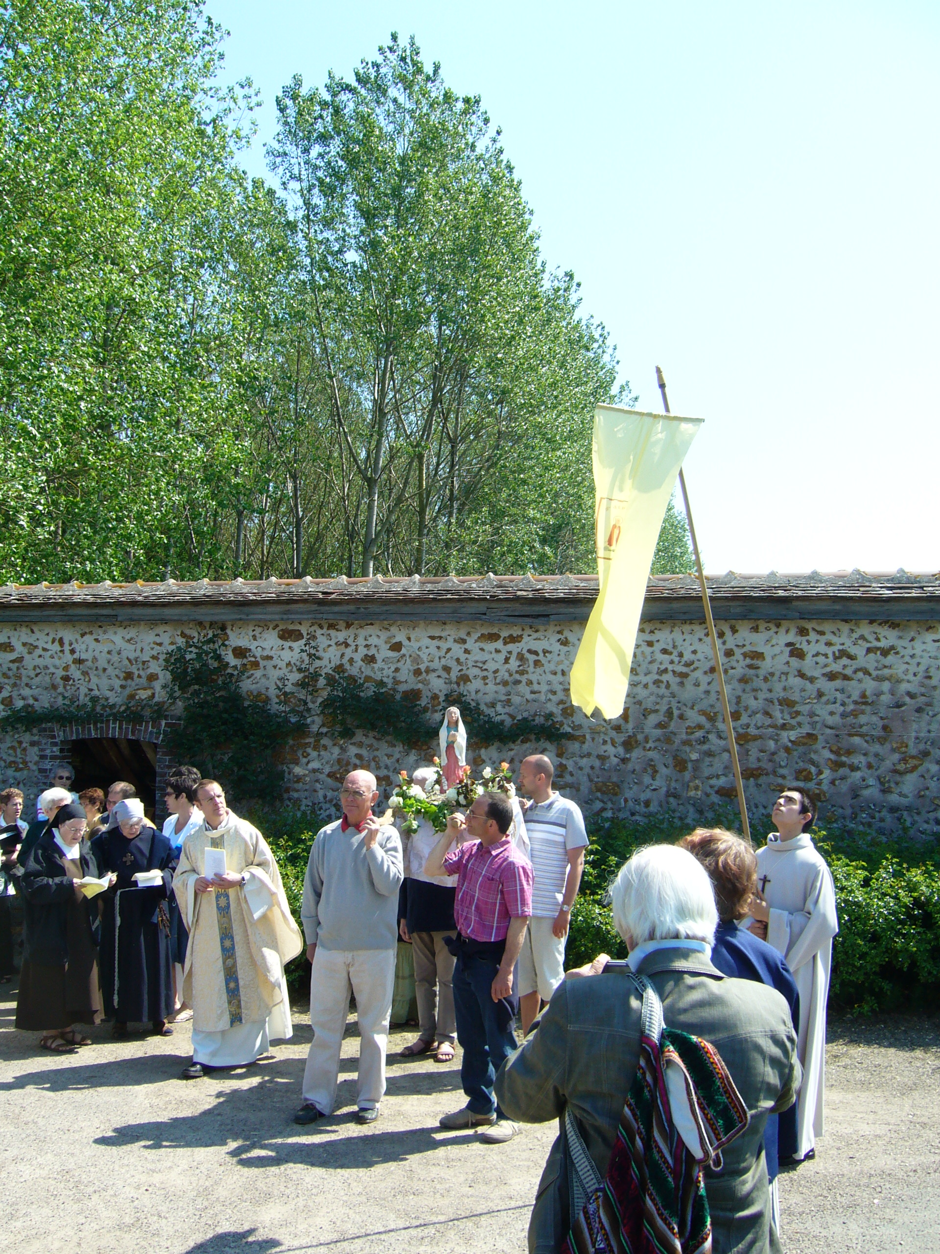 Cudot :pèlerinage de sainte Alpais